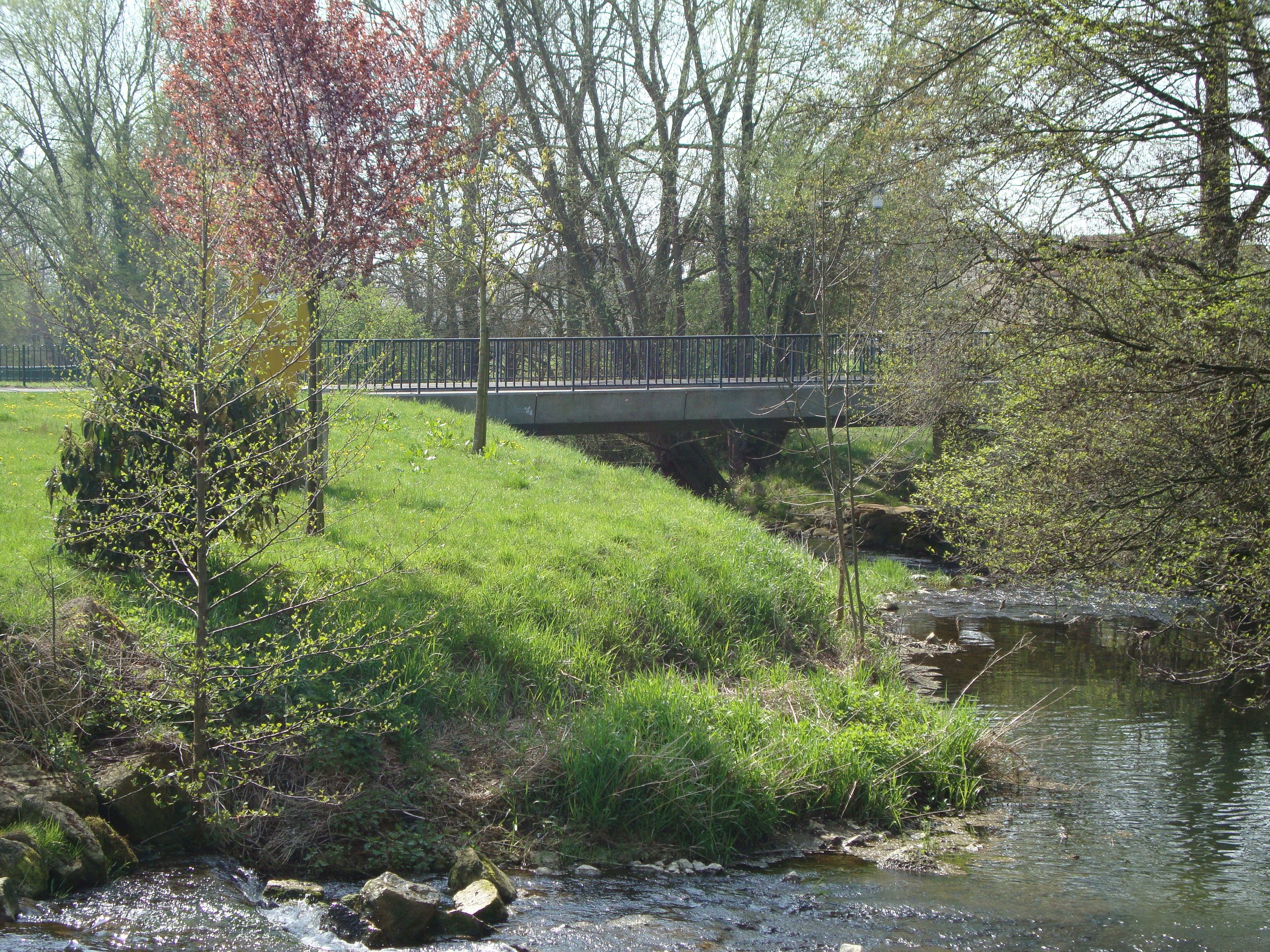 Pont sur la Kiesel